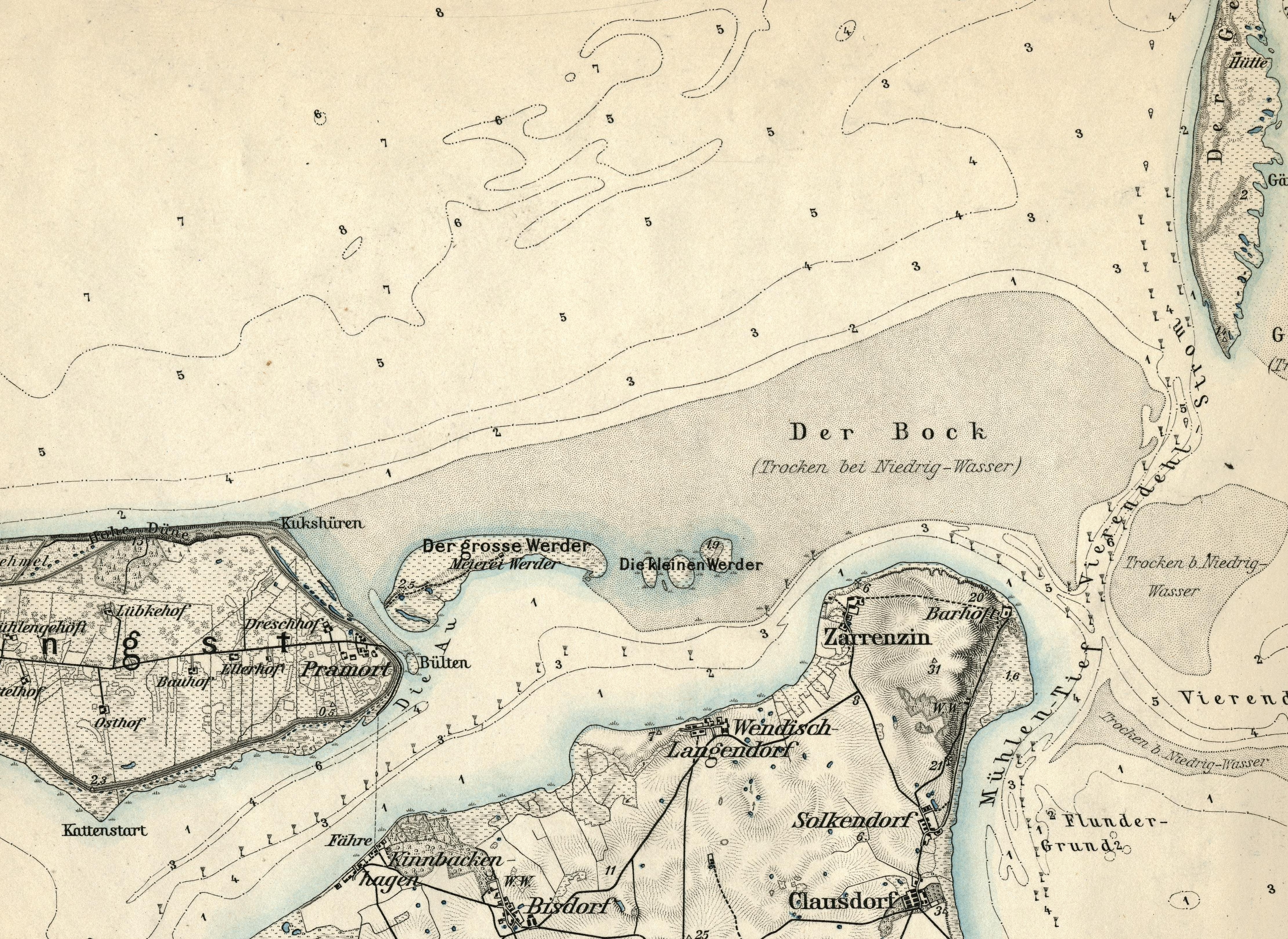 Karte der Sandbank Bock und Umgebung 1893